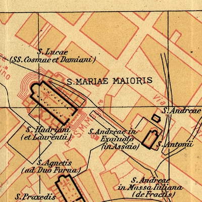 Pianta di Hülsen